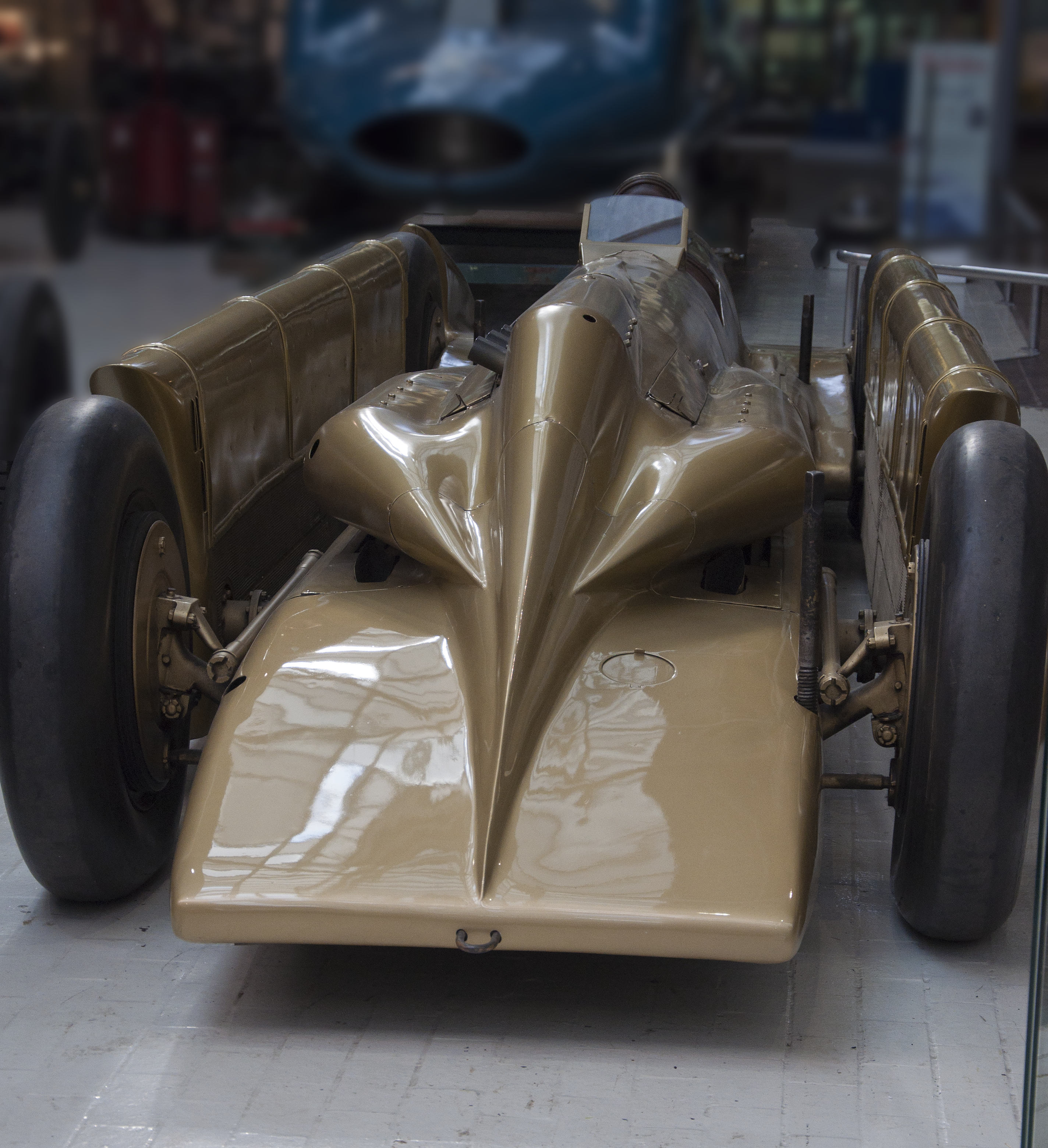 De Golden Arrow waarmee Henry Segrave een wereldrecord snelheid op land vestigde, in het National Motor Museum te Beaulieu, Engeland